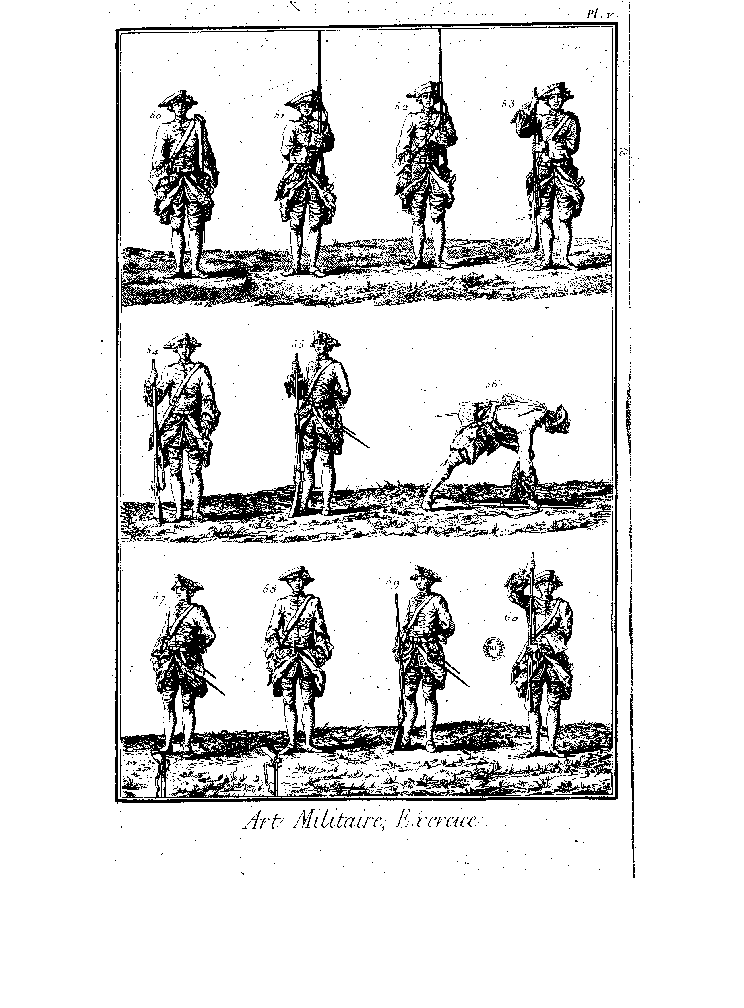 Planches de l'Encyclopédie de Diderot et d'Alembert, volume 1